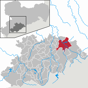 Pockau-Lengefeld im Erzgebirgskreis, Sachsen